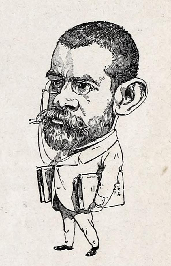 Los hombres del día. Nuestros críticos.